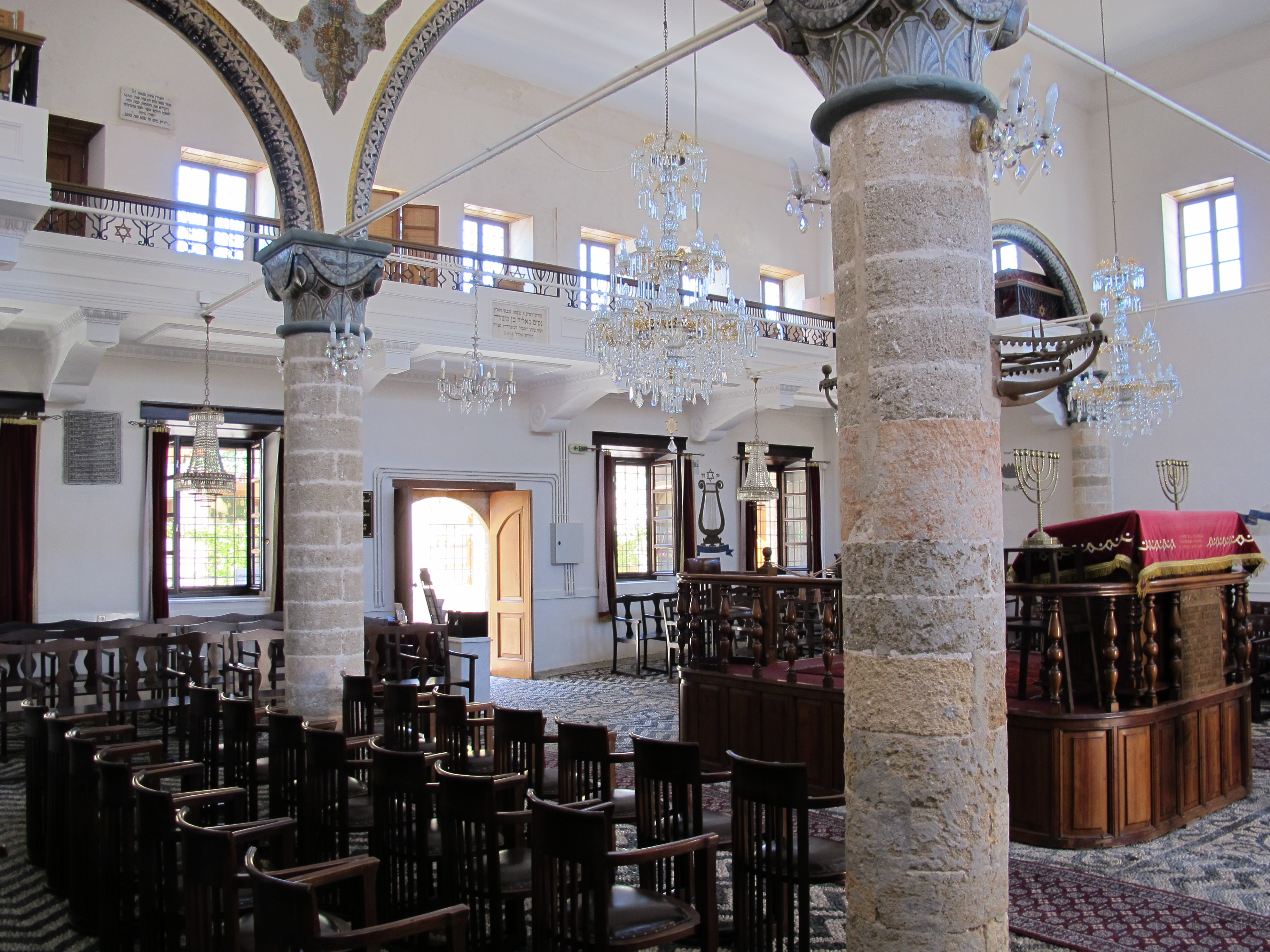 Rosi, Kahal Shalom Synagogue, int.